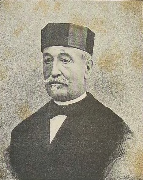 Imatge extreta de la plana 4 de: Poesíes d'En Joseph Lluis Pons y Gallarza. Nueva Biblioteca Balear. Palma. Imprenta y Librería de J. Tous, editor. MDCCCXCII. 1892.